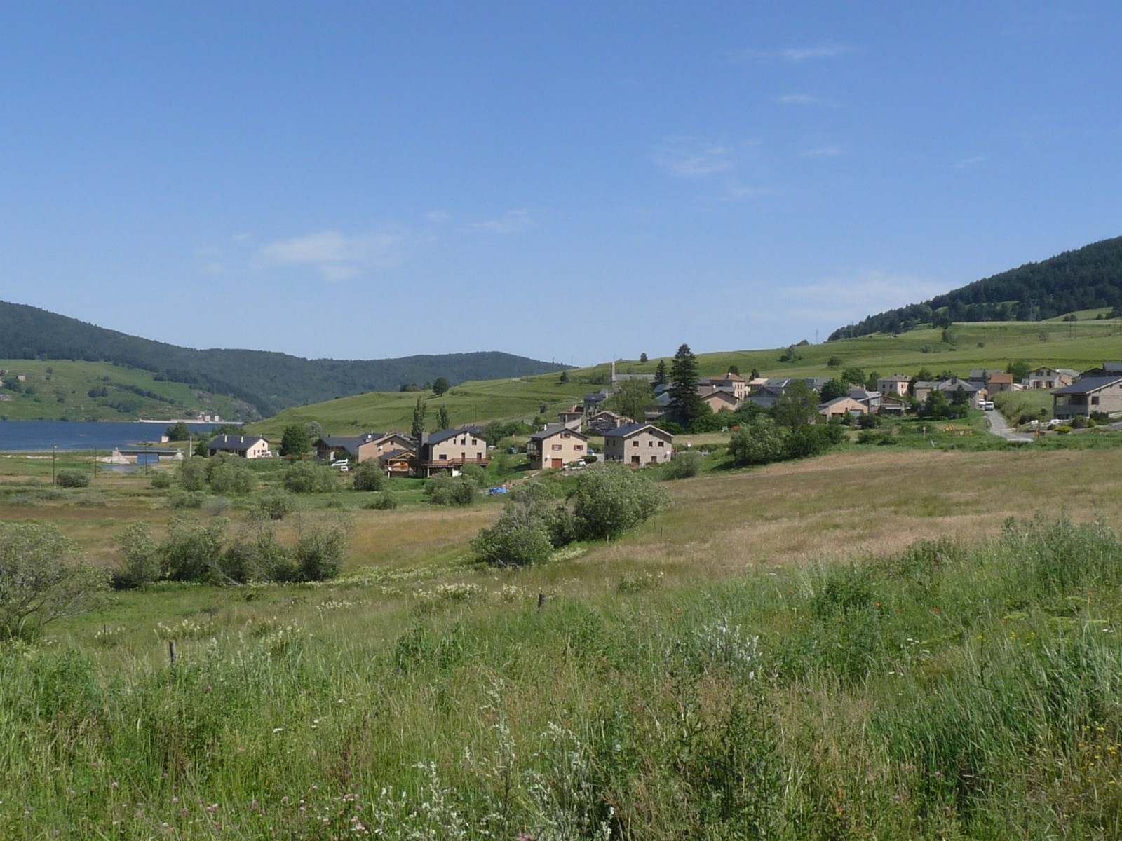 Réal (vue de la route de Villeneuve), Pyrénées-Orientales, France